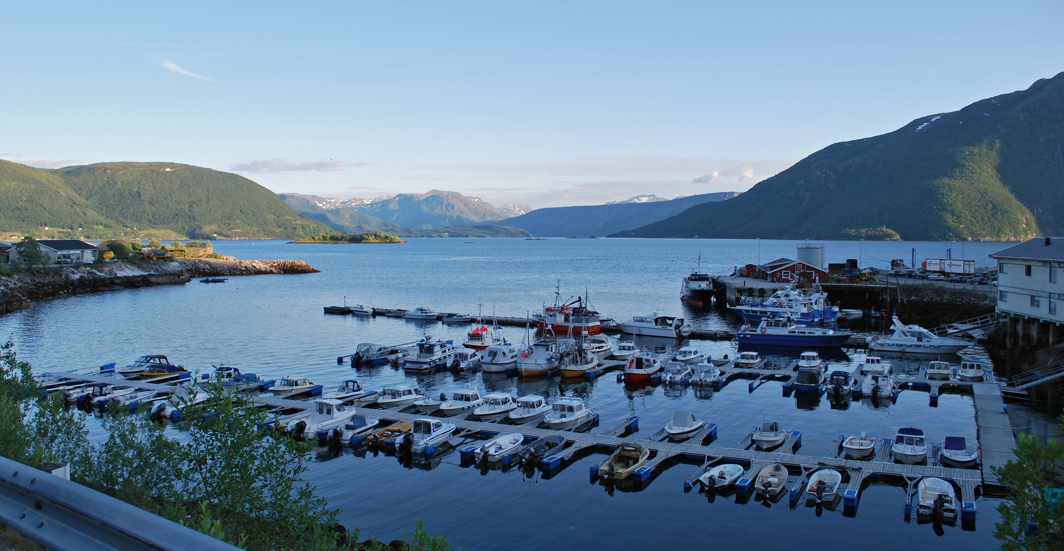 Kjøpsvik småbåthavn